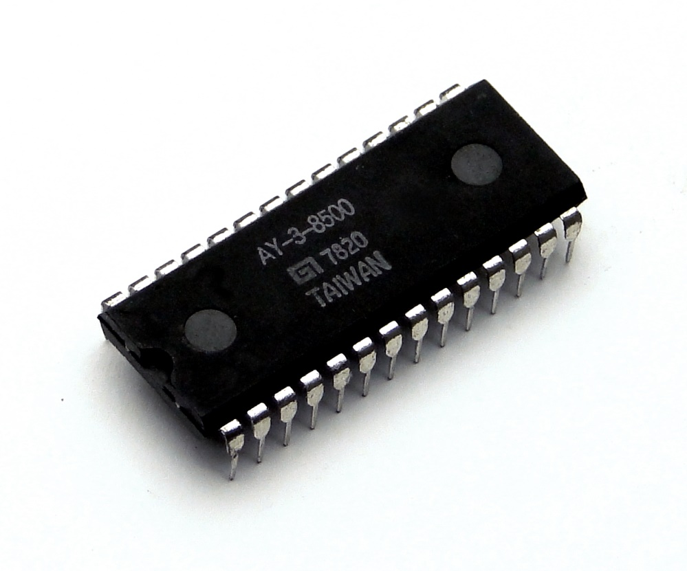 AY-3-8500 IC